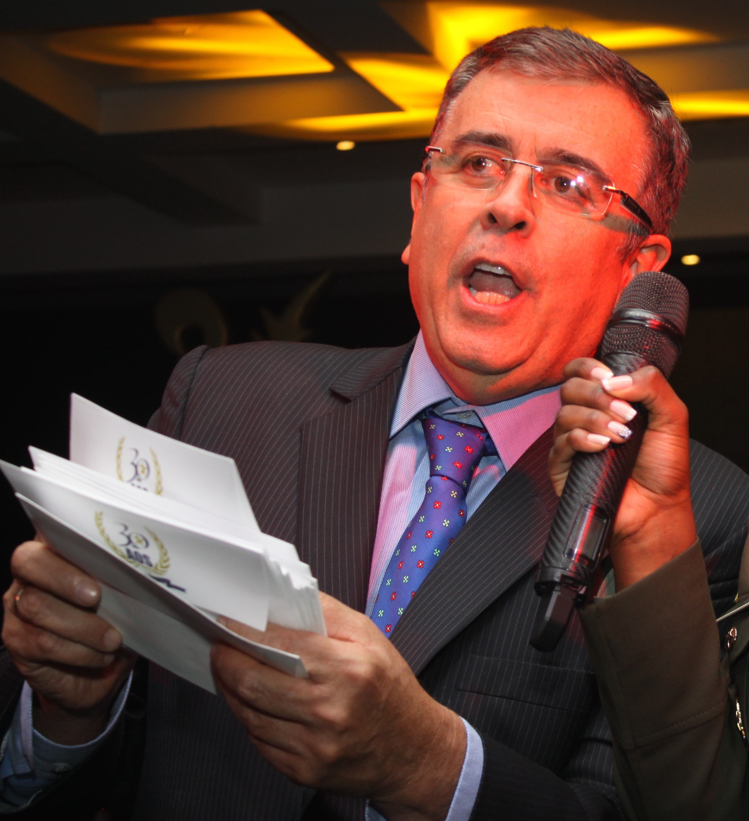 Décimo aniversario de “Café por un Futuro”